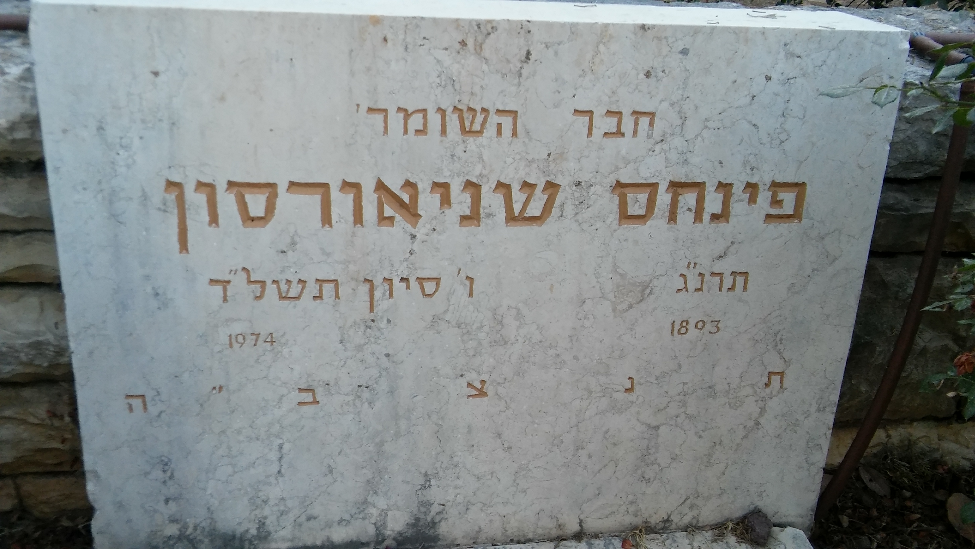 הקבר של פנחס שניאורסון בחלקת השומר בבית הקברות של כפר גלעדי